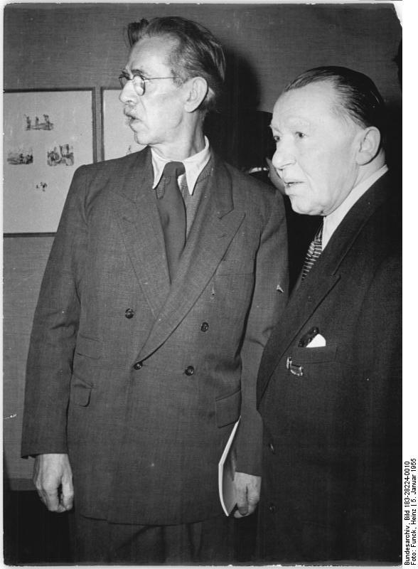 Berlin, Ausstellung sowjetischer Grafik Zentralbild Funck 5.1.1955 Ausstellung Sowjetischer Graphik Im Zentralen Haus der Deutsch-Sowjetischen Freundschaft in Berlin wurde am 5.1.1955 eine Ausstellung hervorragender sowjetischer Graphik aus der künstlerischen Schaffensperiode 1917-1954 eröffnet. Die Ausstellung findet auf Initiative der Deutschen Akademie der Künste im Rahmen des Sowjetisch-Deutschen Kulturabkommens statt. Der Eröffnung wohnten der Vorsitzende des Ministerrates der Deutschen Demokratischen Repubkik Otto Grotewohl, Volkskammerpräsident Dr. Dieckmann, das Diplomatische Korps, sowie Mitglieder der Akademie und Nationalpreisträger bei. UBz: Der Vizepräsident der Deutschen Akademie der Künste, Nationalpreisträger Otto Nagel und Nationalpreisträger Lingner, Mitglied der Akademie der Künste, in den Ausstellungsräumen. Abgebildete Personen: Nagel, Otto Prof.: Maler, Präsident der Akademie der Künste (AdK), Nationalpreisträger, Vaterländischer Verdienstorden (VVO) in Gold, DDR (GND 118586300) Lingner, Max Prof.: Maler, Zeichner, DDR